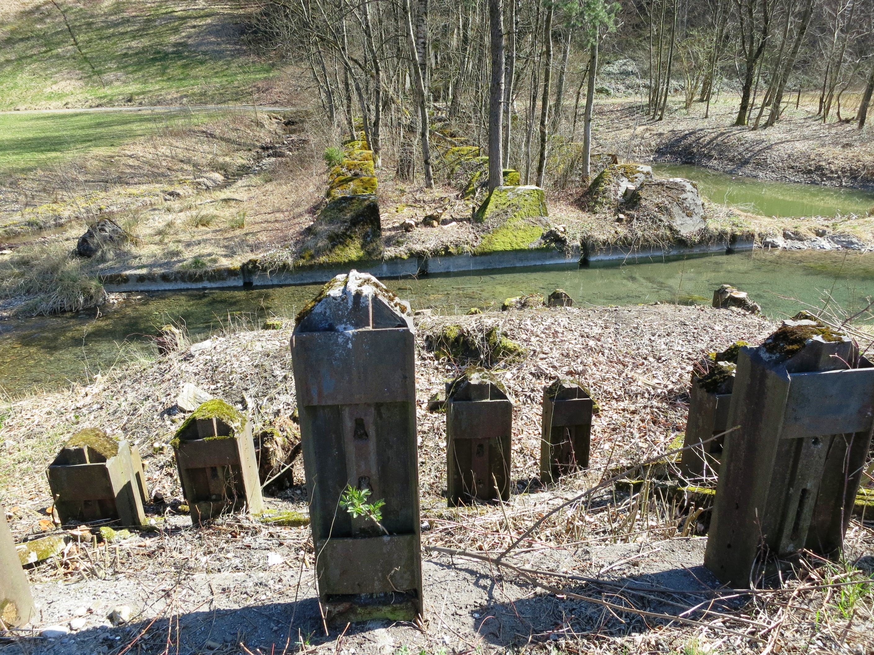 Geländepanzerhindernis, Näfels GL, Schweiz